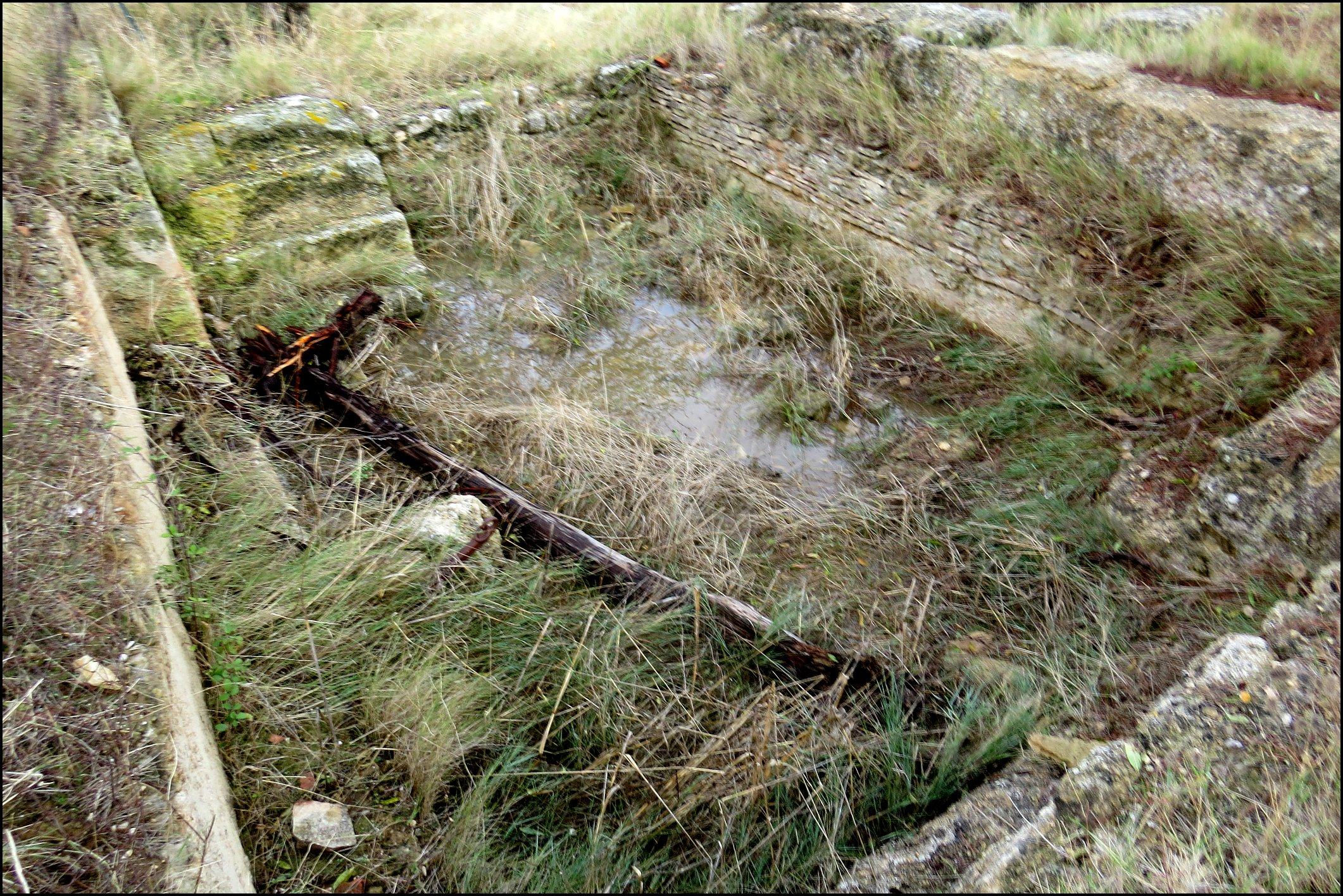 Vue d'ensemble oblique de la grande piscine, "A" ou "froide", de la villa gallo-romaine de Vivios (Lespignan, Occitanie). Les deux escaliers sont visibles. Elle contient de l'eau de pluie et un tronc de cyprès tombé accidentellement.